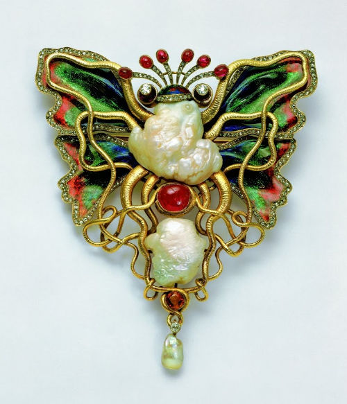 Broche met vlinder en octopus, ontworpen ca. 1900 door W.L. von Cranach